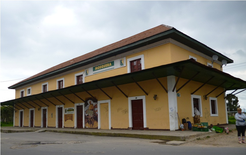 casa de la cultura mosquera 2012